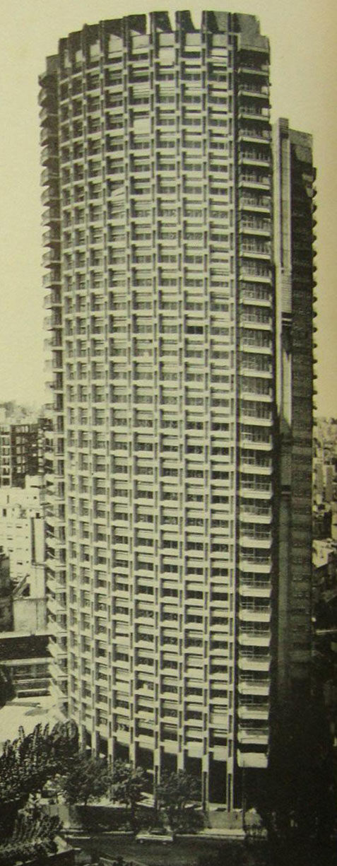 La Torre Dorrego, edificio de viviendas para oficiales de las Fuerzas Armadas de la Argentina. Avenida Dorrego 2699, Buenos Aires. Arquitectos: Caffarini, Joselevich y Ricur. Año 1968.